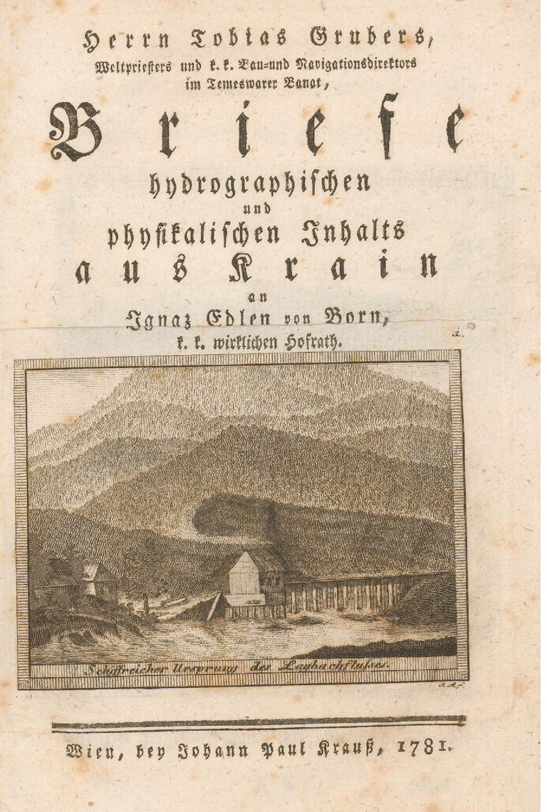 Naslovna stran: Tobija Gruber - Hidrografska in fizikalna pisma s Kranjske